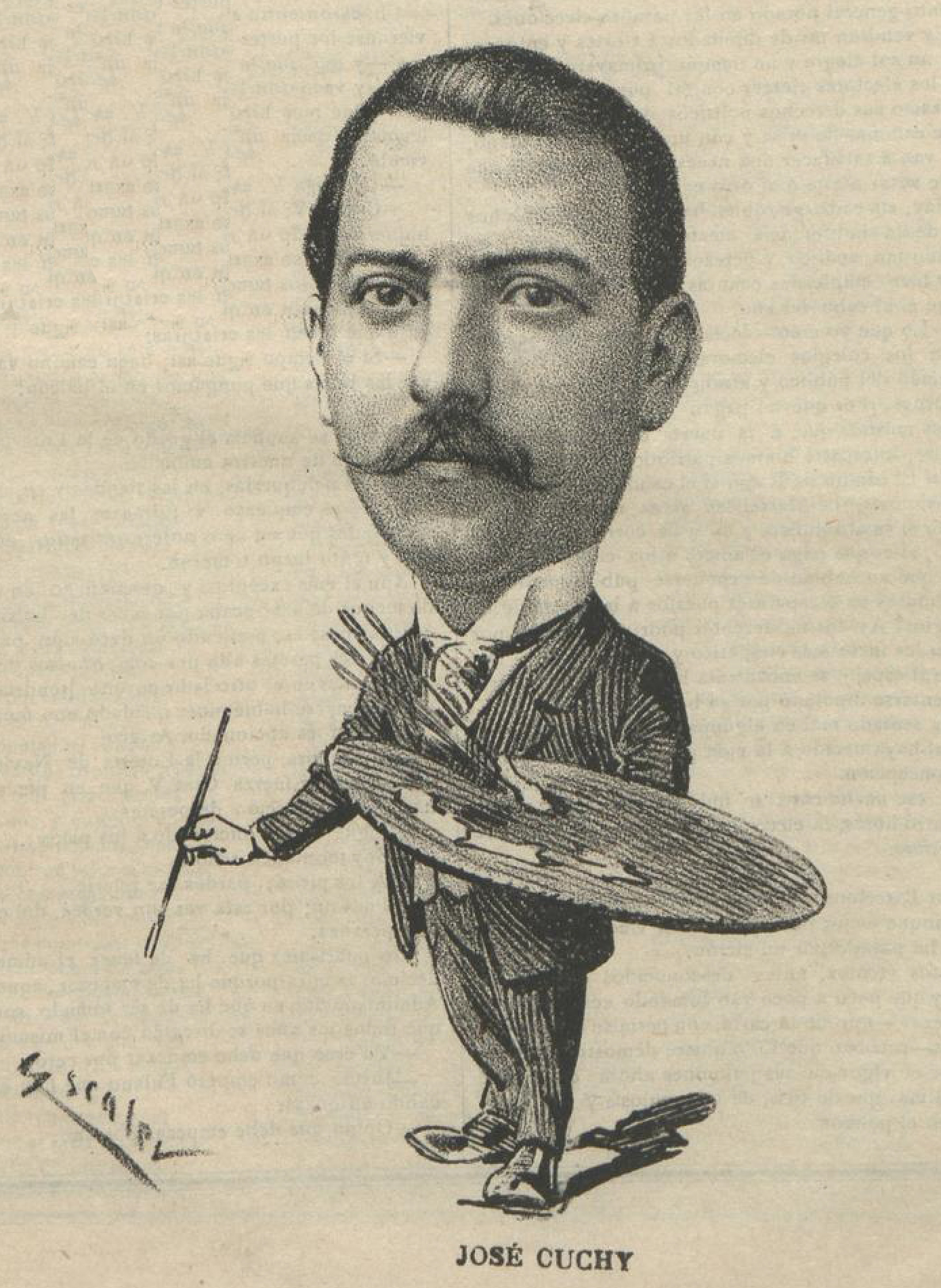 José Cuchy.